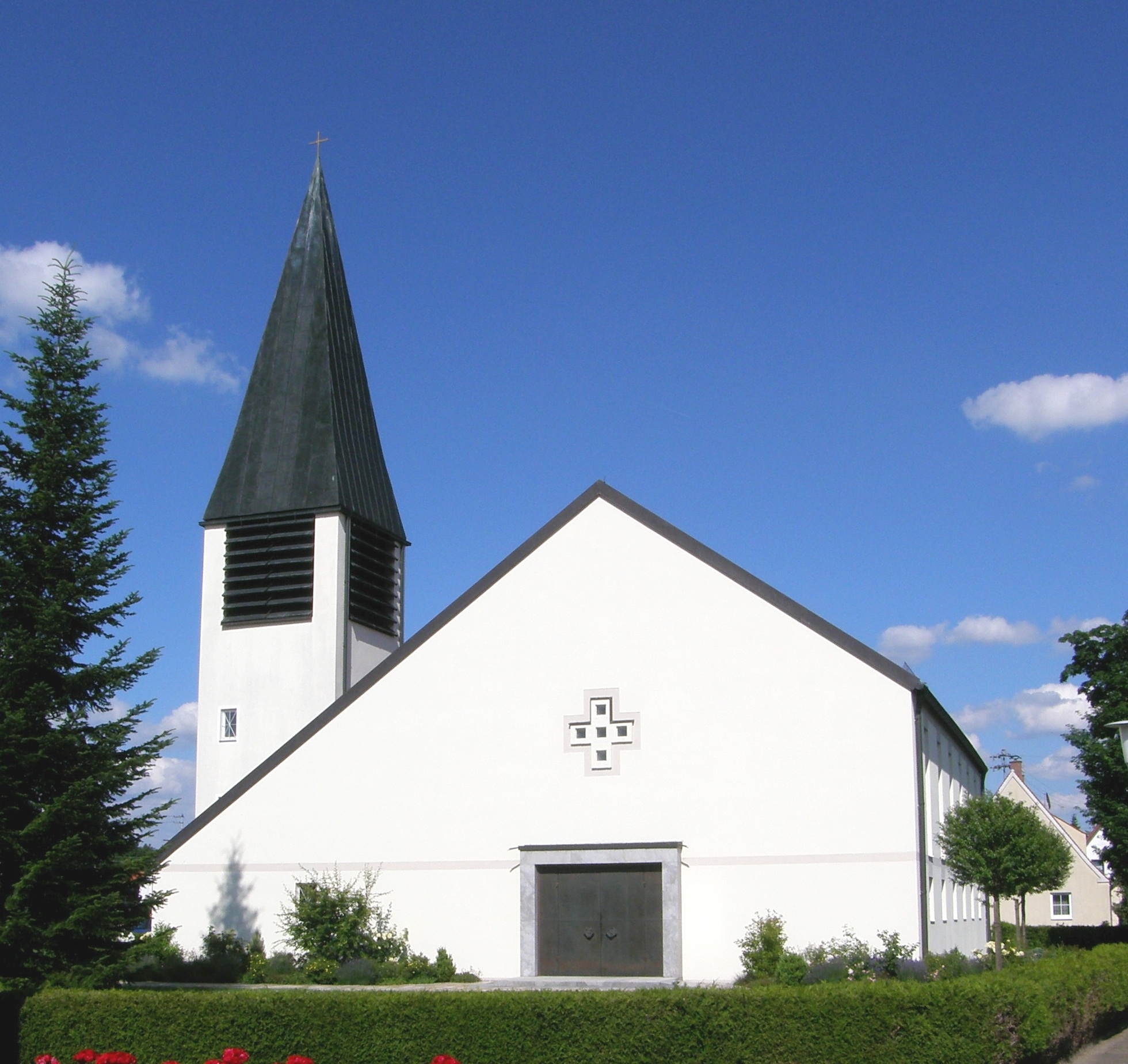 Pfarrkirche St. Pius in Löpsingen